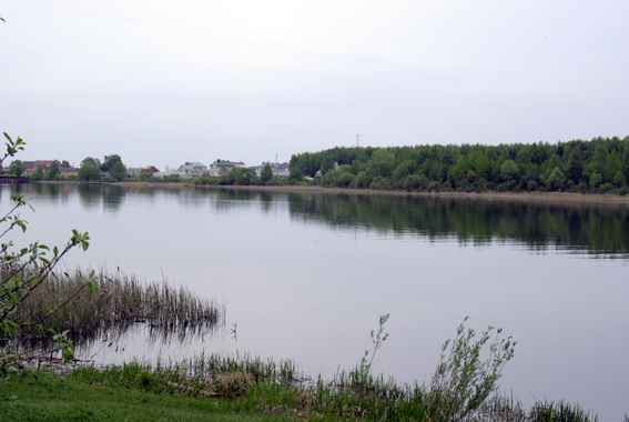 Матыра (верховья матырского водохранилища р-он "Хомут")